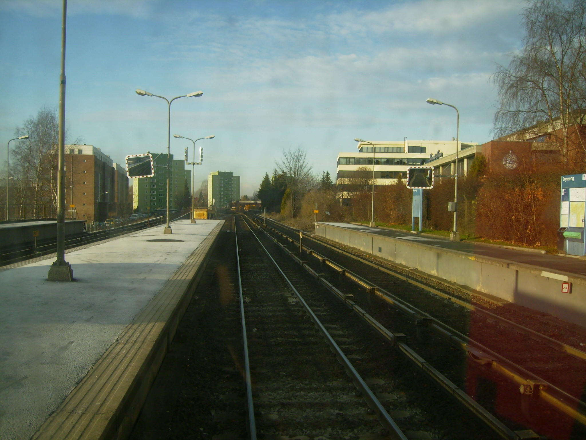 Brynseng stasjon vestover sett innenfra et Tx-tog. Brynseng metro station looking westwards, seen from inside a Tx train.